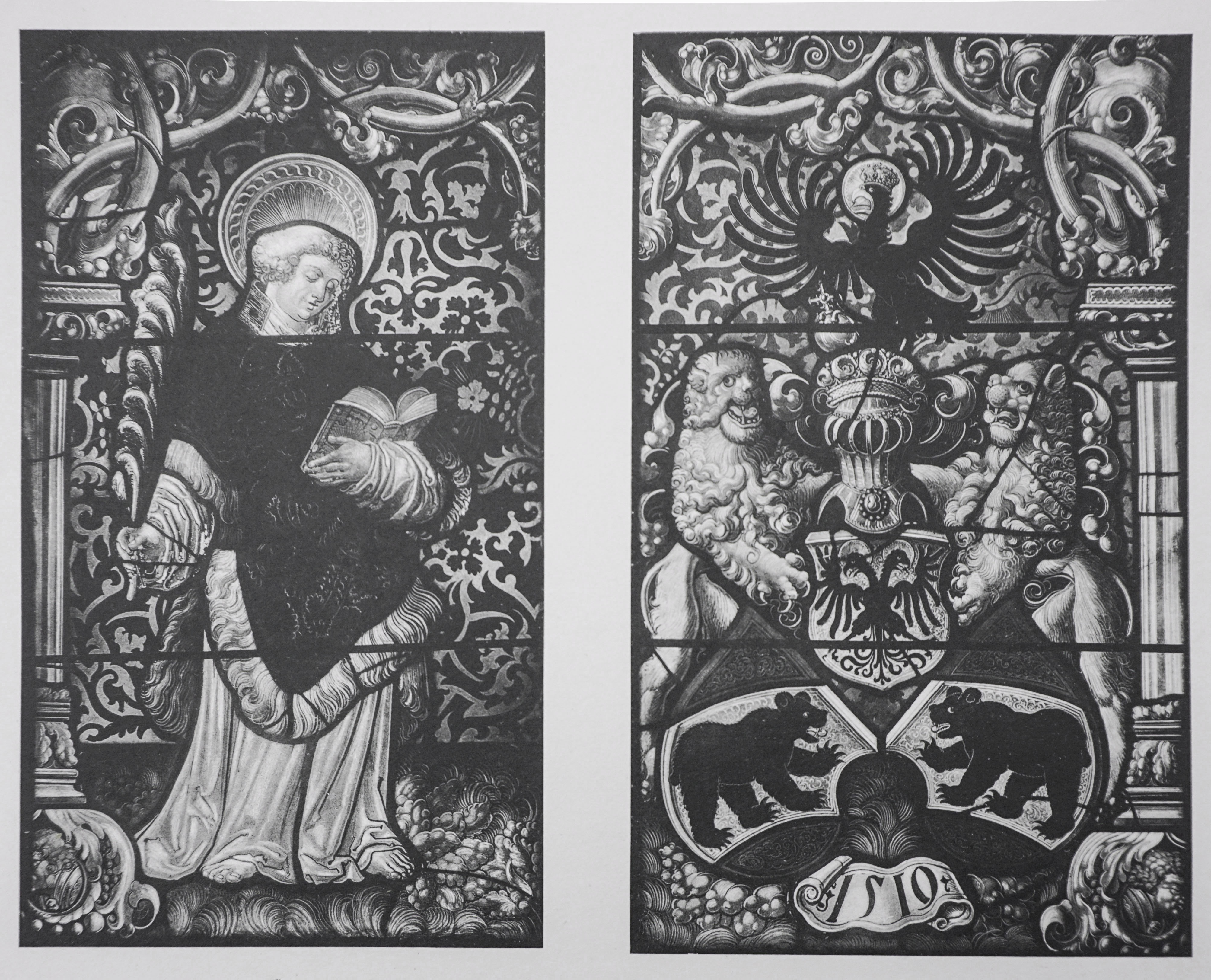 Vinzenz von Valencia, Patron Berns und Standeswappen von Bern, mittleres Chorfenster.